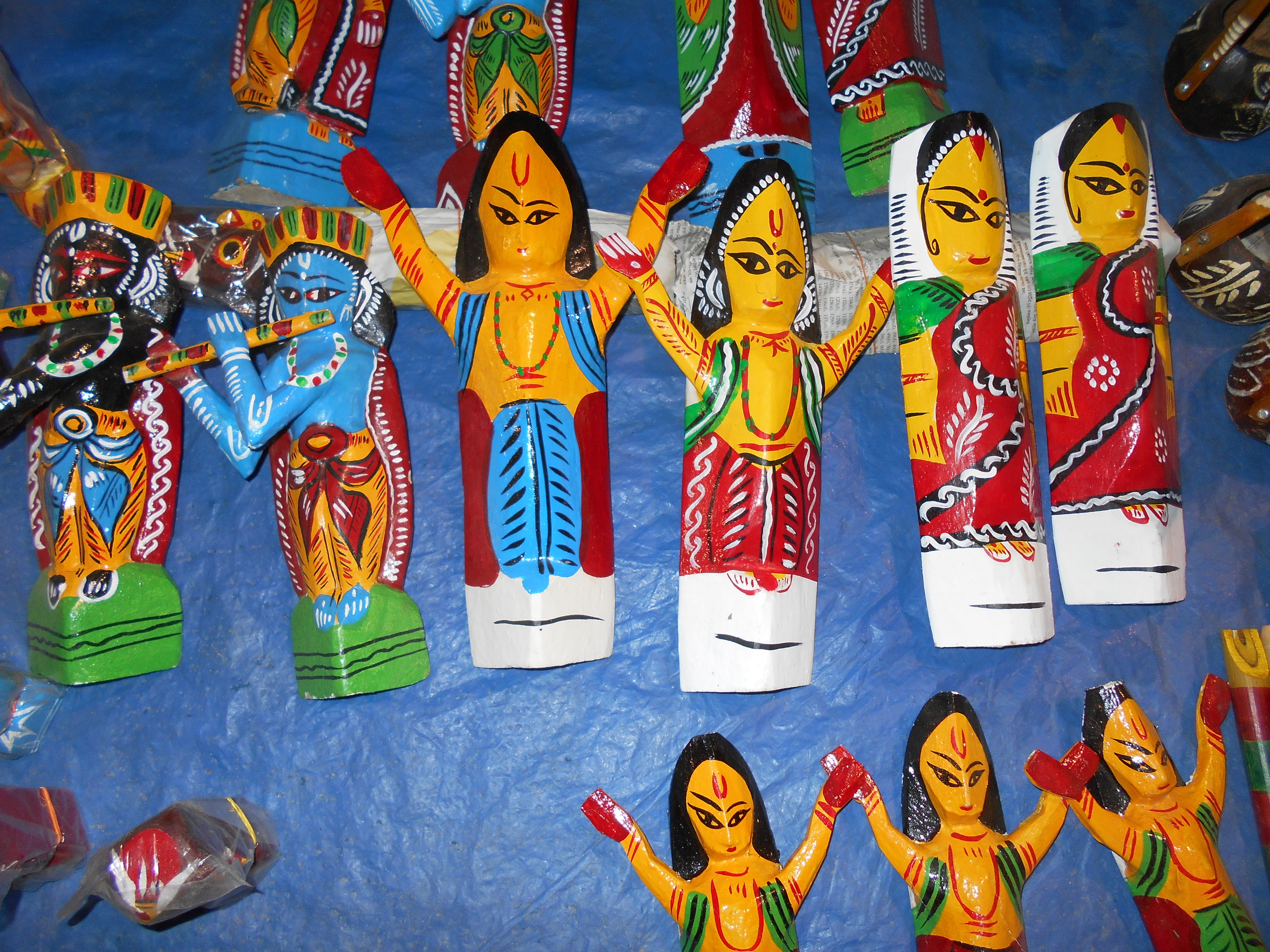 নতুনগ্রামের কাঠের পুতুল